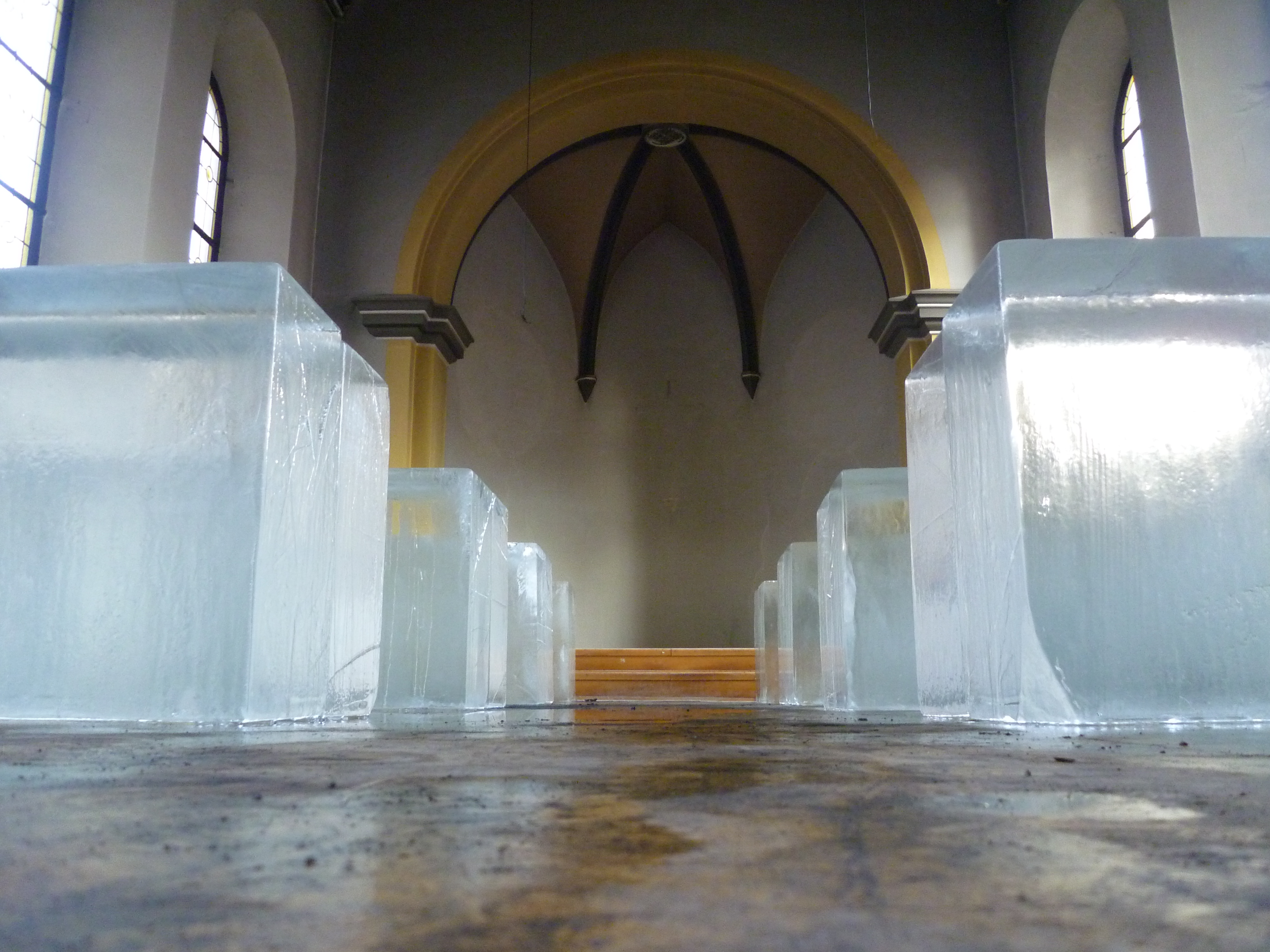 Installation in der ehem. Kapelle des KKH Erfurt